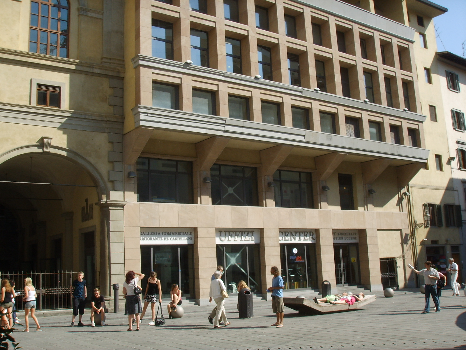 Ex-cinema capitol